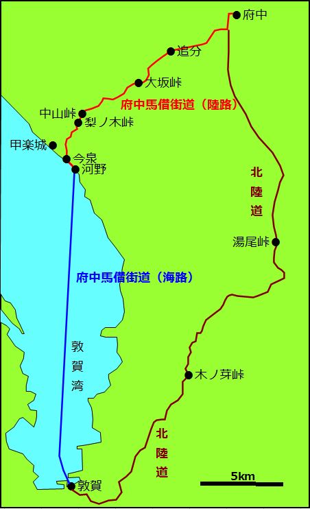 北陸道の木ノ芽峠を経由すると、敦賀から府中までは40kmで、険しい山地を抜ける必要があった。一方、府中馬借街道では、敦賀から今泉・河野までを船で移動することで険山を回避、今泉から府中に向かうことで、陸路は20km程度となり、大幅に省力化されるため、物資輸送路として隆盛した。